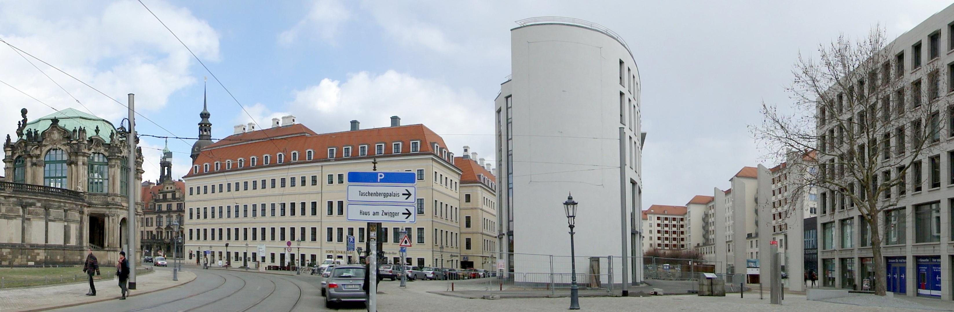 Panorama Zwinger-Schloss-Taschenbergpalais-Advantariegel-Gedenkstätte Sophienkirche-Haus am Zwinger (v.l.n.r.)